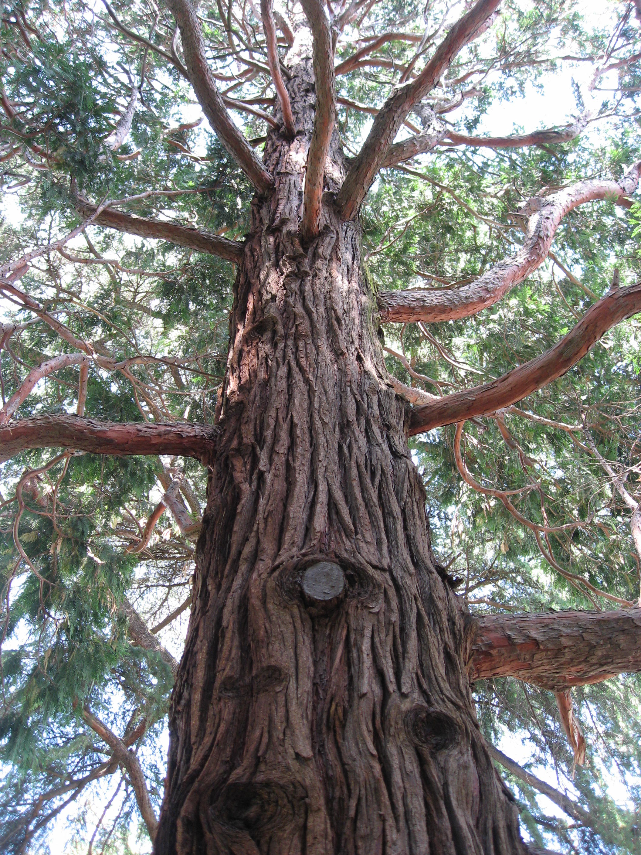 Calocedrus decurrens in Giardino dei Semplici di Firenze Map: 43° 46' 45" N 11° 15' 39" E